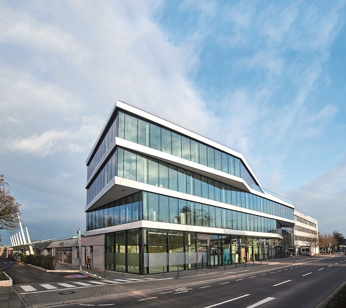 Die Zentrale der Knauber Unternehmensgruppe in Bonn 2018